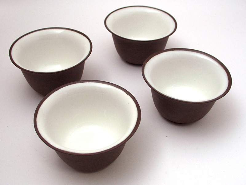 茶杯，撮影者提供。 Bân-lâm-gú: 茶甌